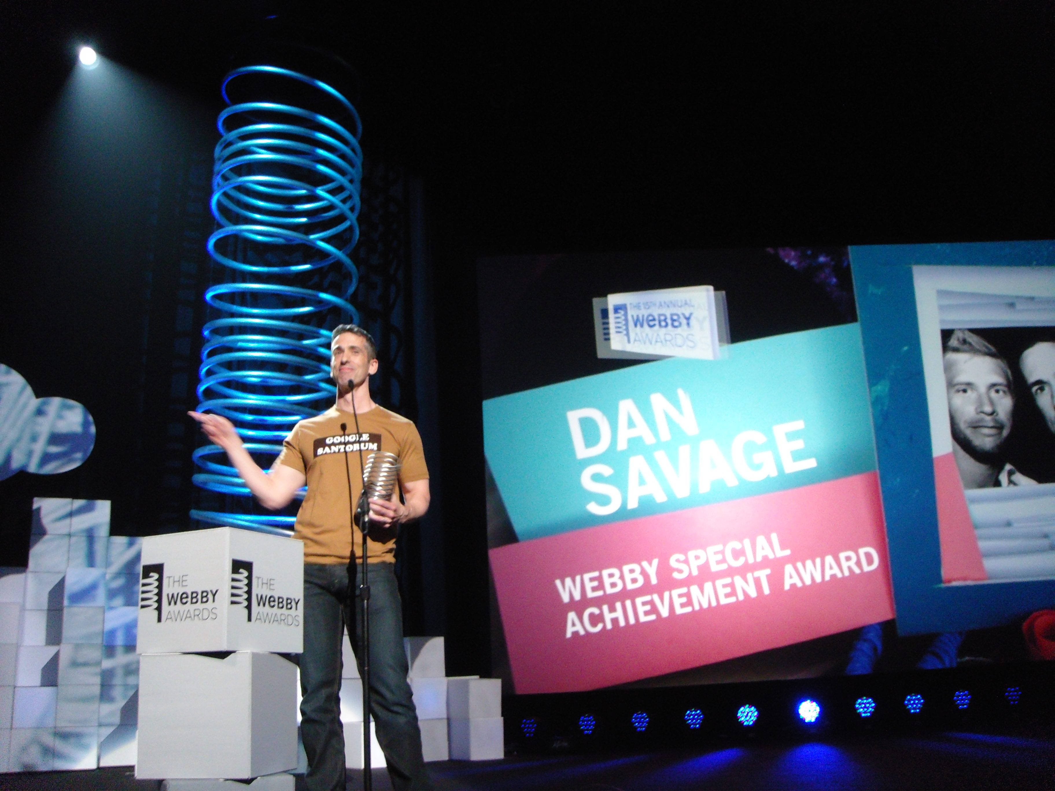 Dan Savage - It Gets Better